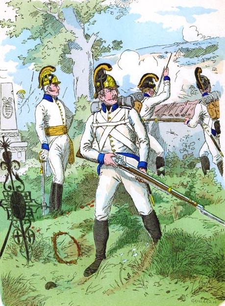 Angehörige des k.k. Infanterie-Regiments Nr. 4 im Jahre 1804